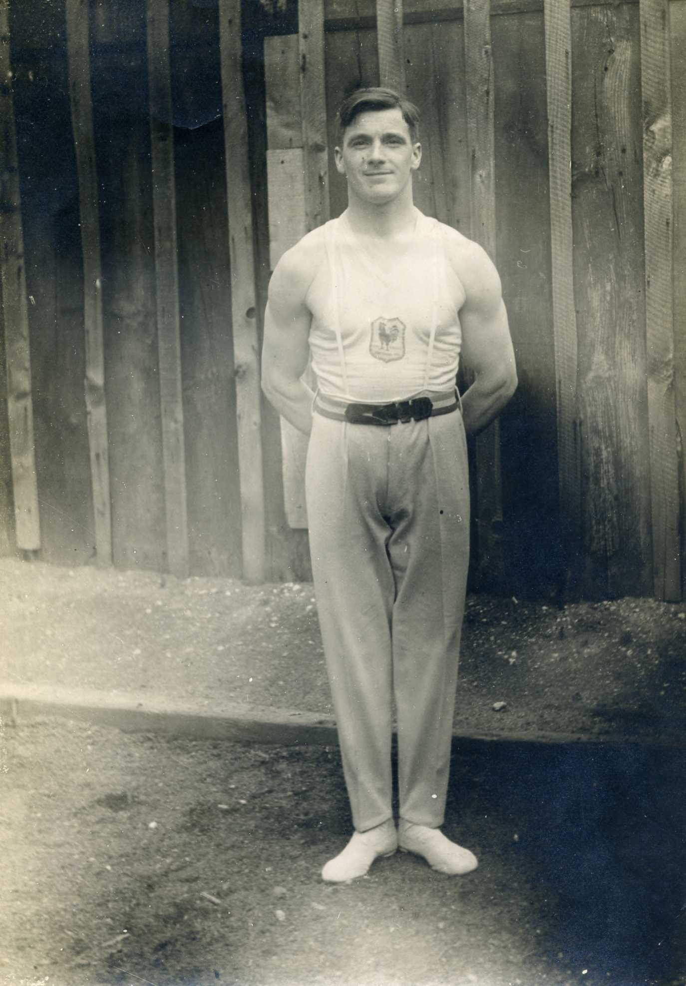 Il s'agit de la photographie d'André LEMOINE (ancien gymnaste français né le 25.11.1903 et décédé le 19.06.1978 à Chartres(28), qui a participé aux JO d'Amsterdam en 1928).Son palmarès apparait sur wikipédia à André LEMOINE.